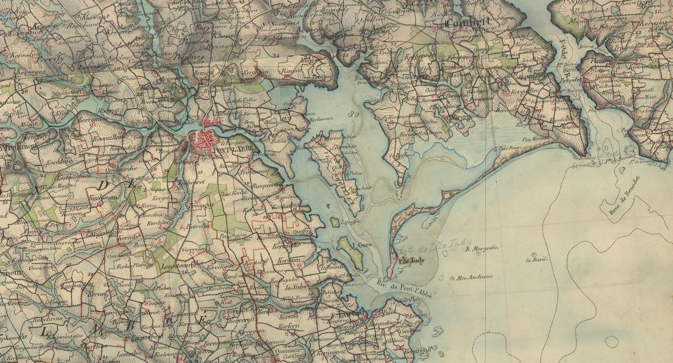 Carte de l'Île-Tudy entre 1840 (la digue face à la mer existe déjà) et 1850 (avant la construction de la digue de Kermor